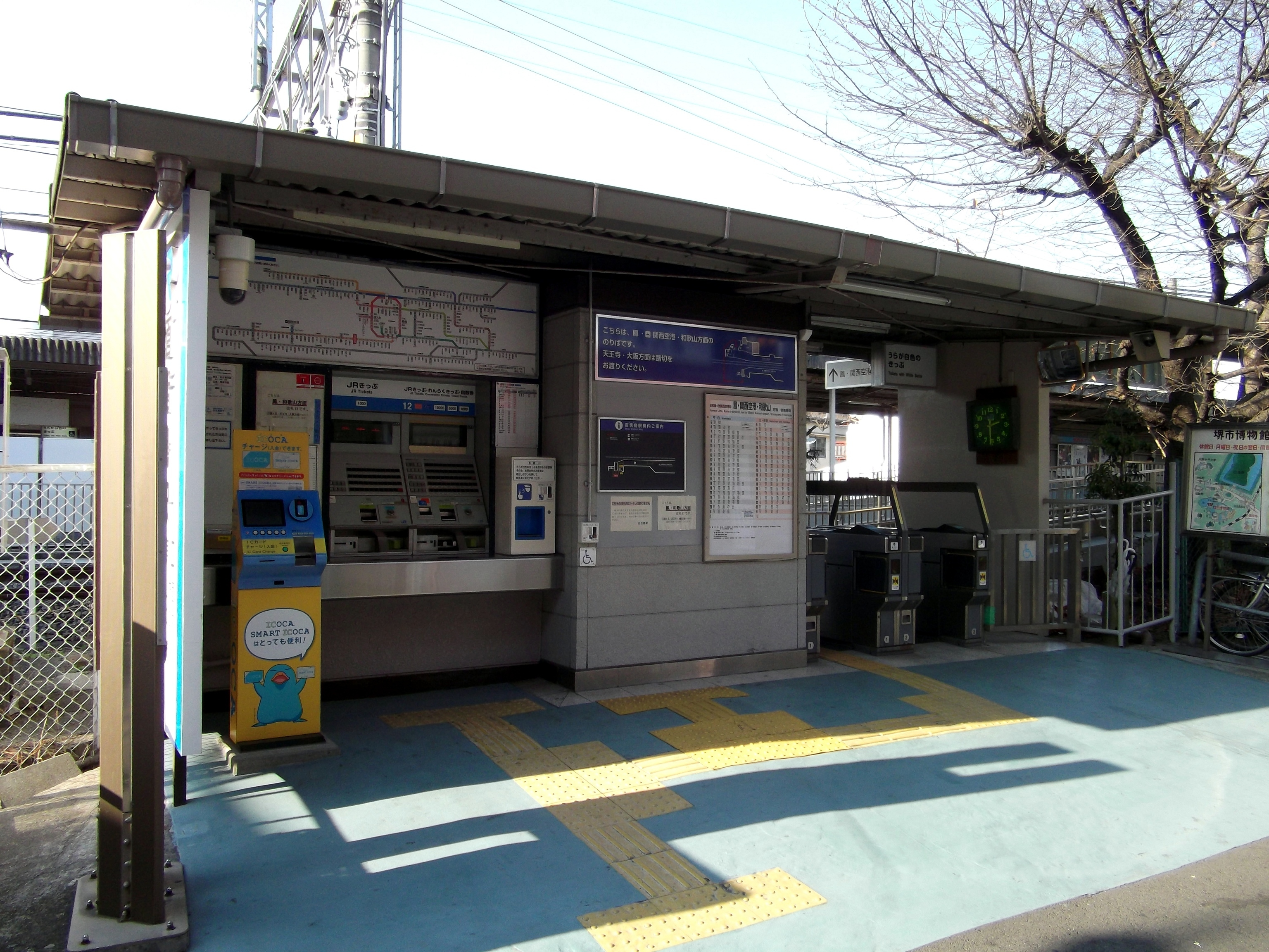 百舌鳥駅和歌山方面改札口